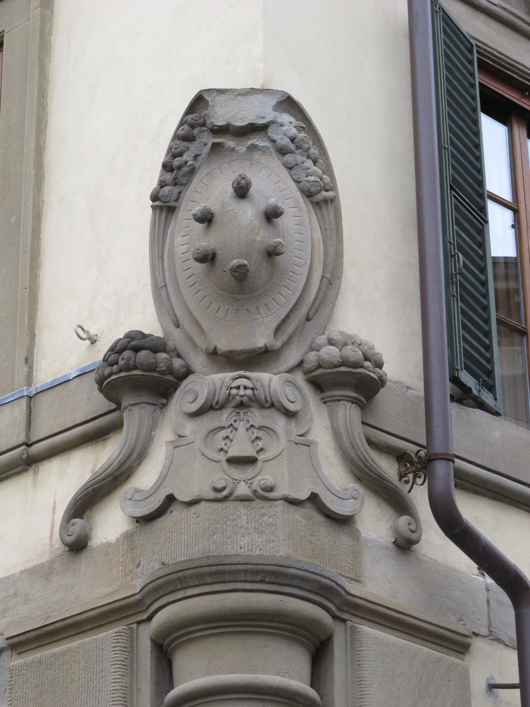 Casa di andrea del sarto, stemma medici